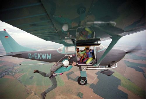 Cessna 182 beim Absetzen von Fallschirmspringern am brandenburgischen Flugplatz Eggersdorf